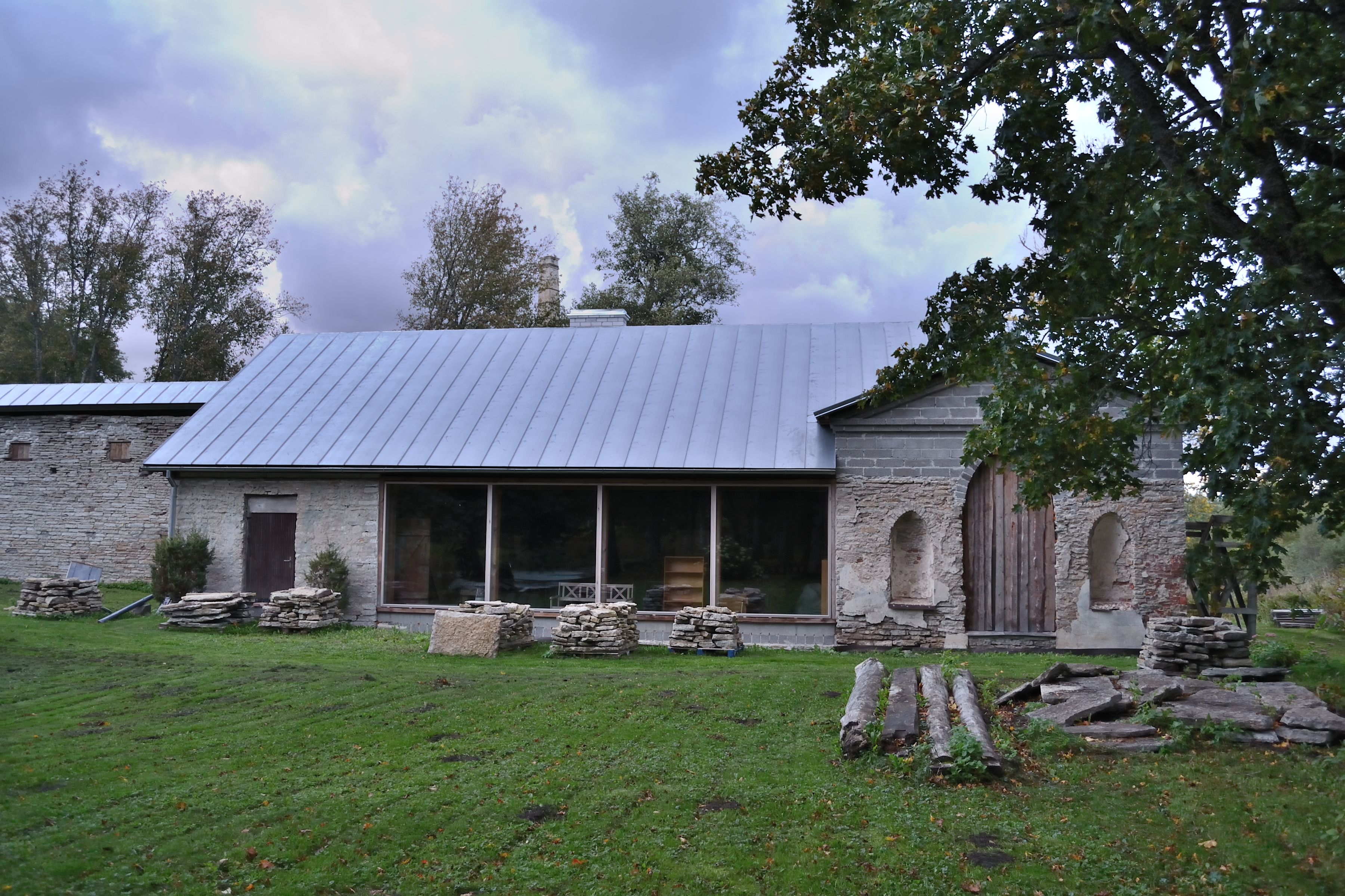 Vääna mõisa triiphoone aednikumajaga, 19.saj